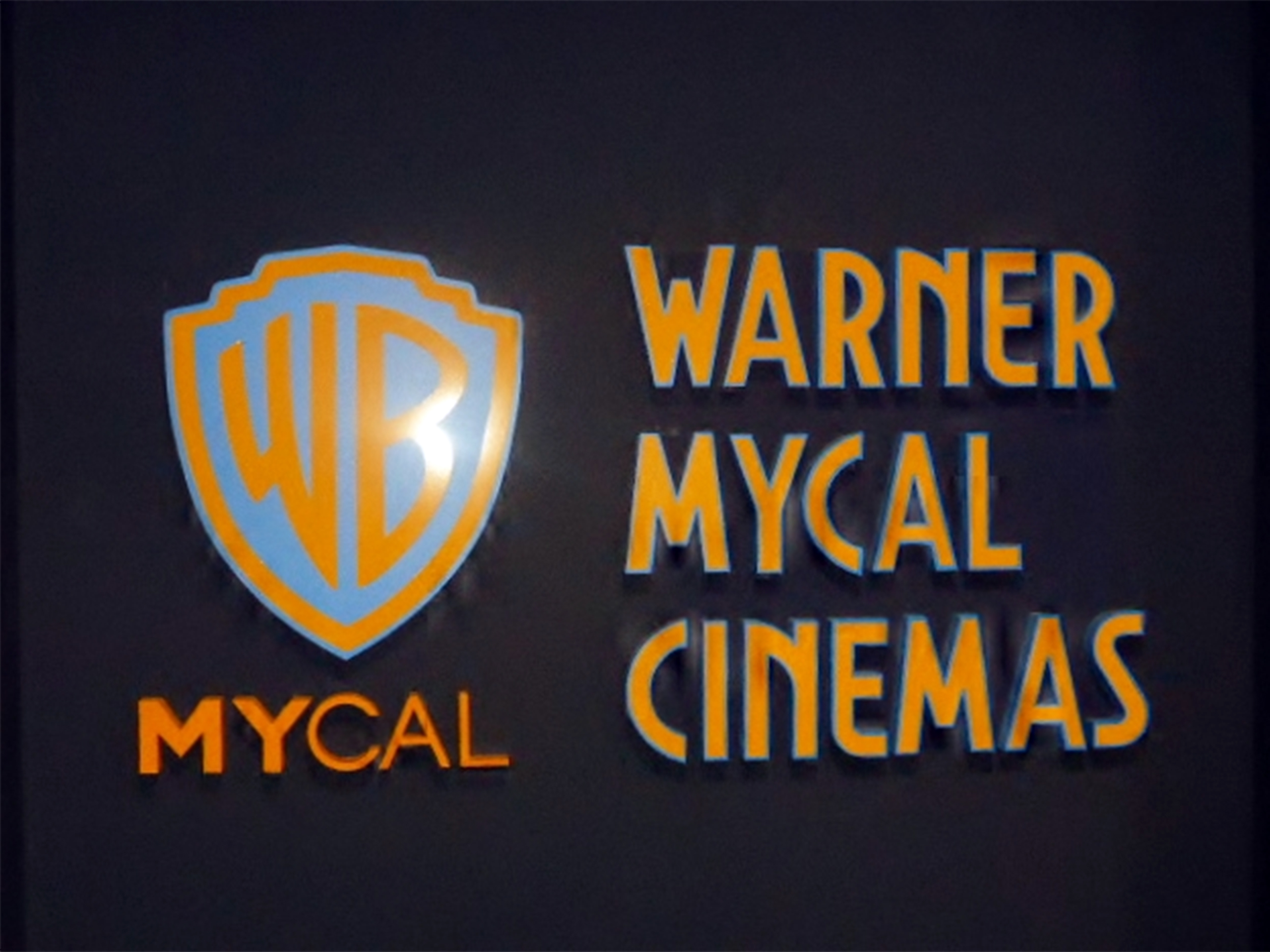 ワーナー・マイカル・シネマズのロゴを撮影。機会があればより大きなサイズの物に後日差替予定。